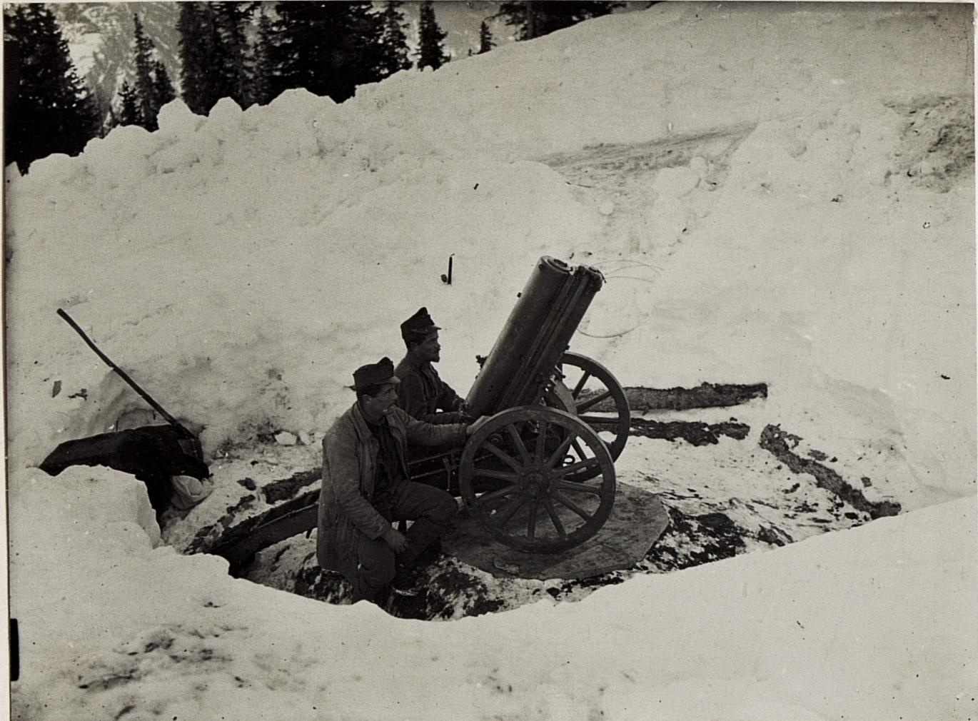 7cm Gebirgsgeschütz M14 auf Bambestaplateau, Fliegerabwehr.